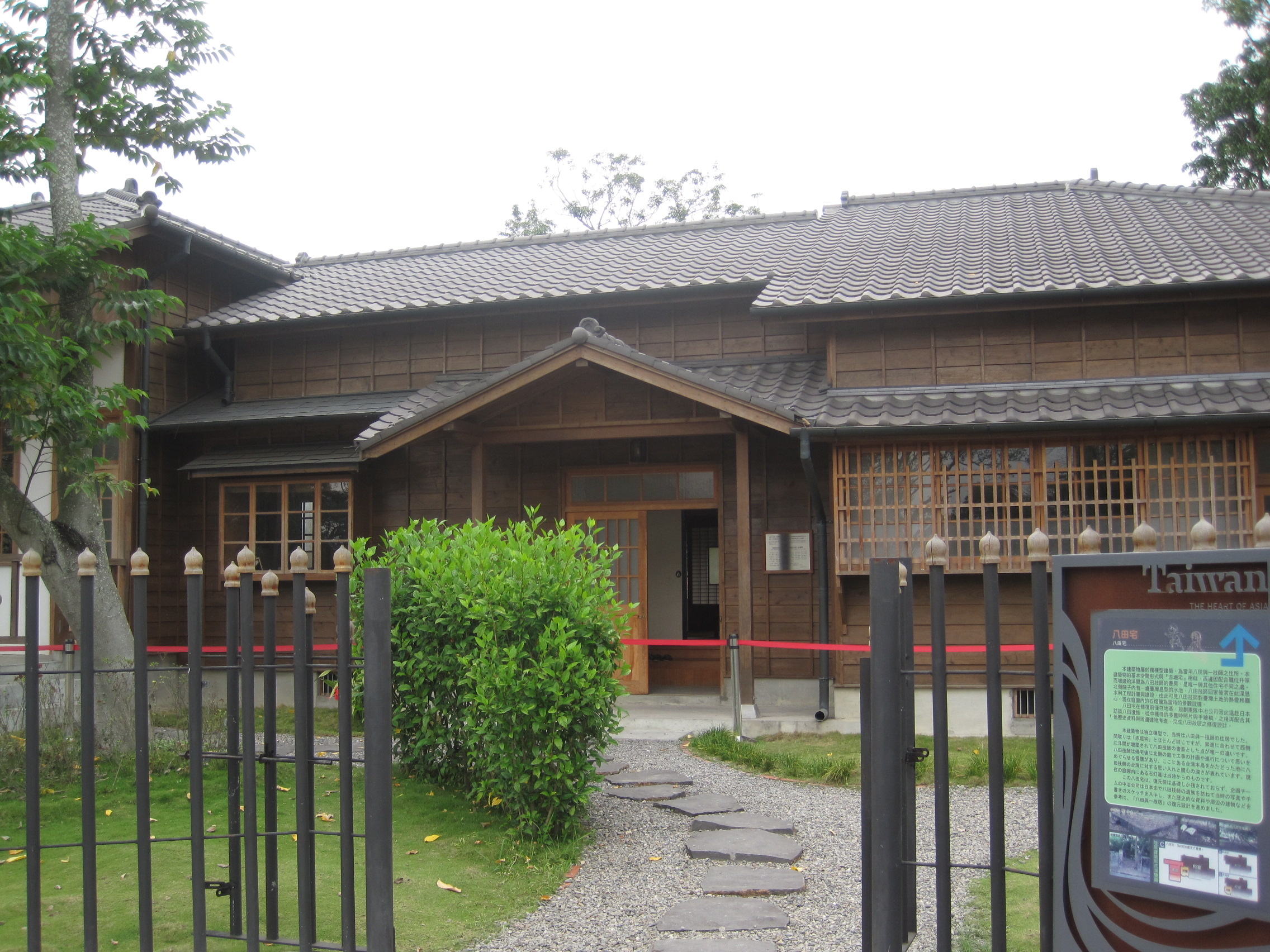 重建的八田與一住宅